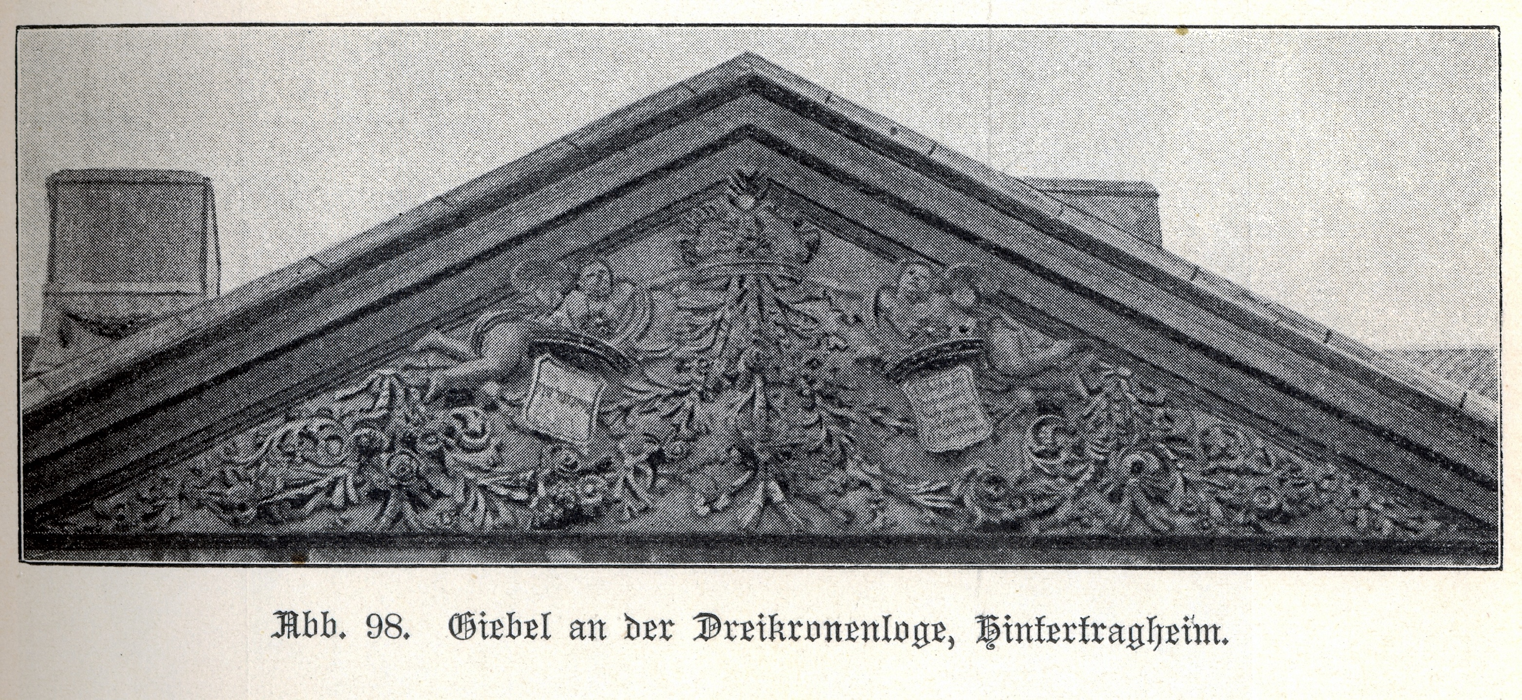 Königsberg, Hintertragheim, Giebel an der Dreikronenloge